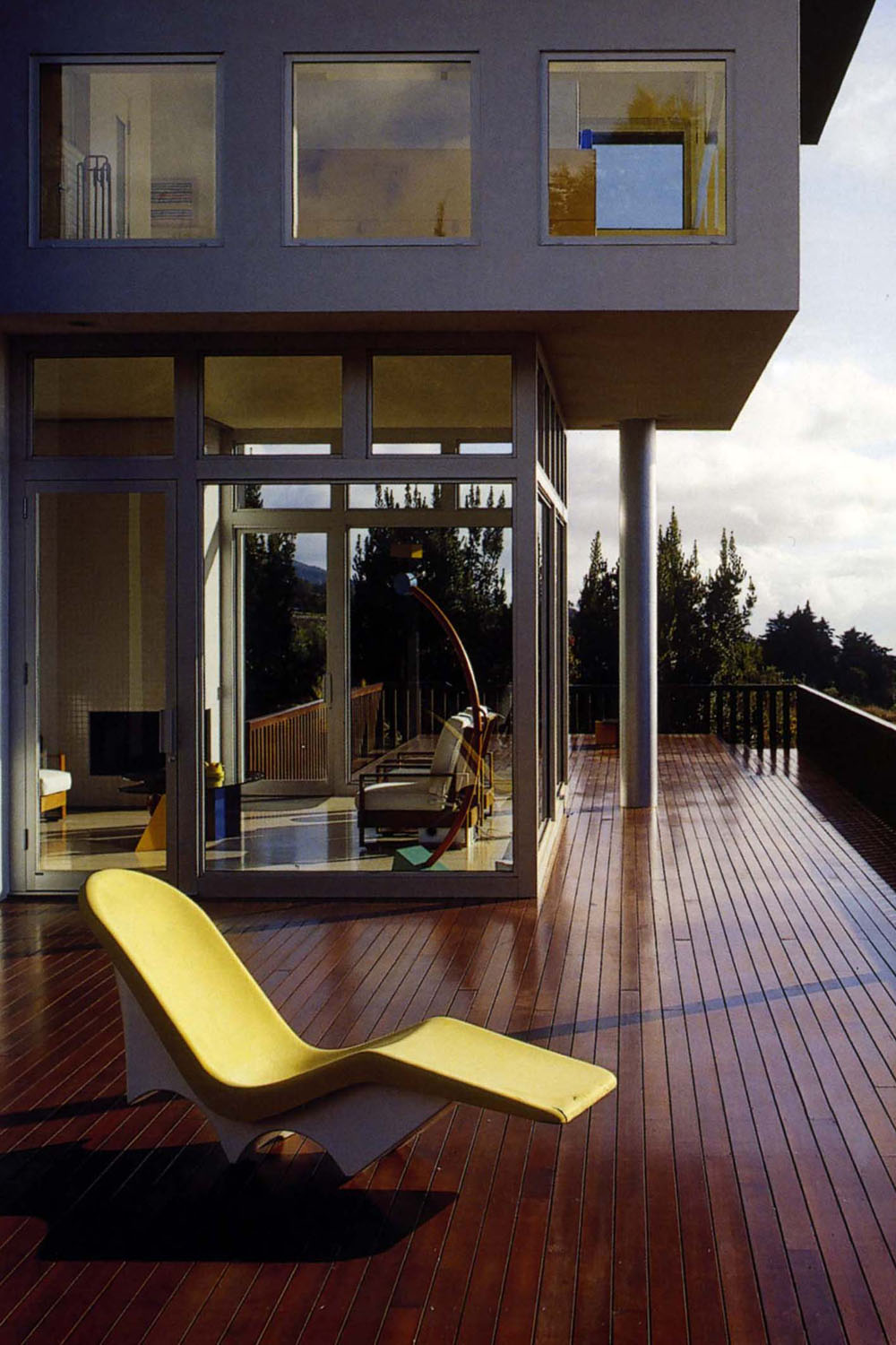 терраса как часть дома